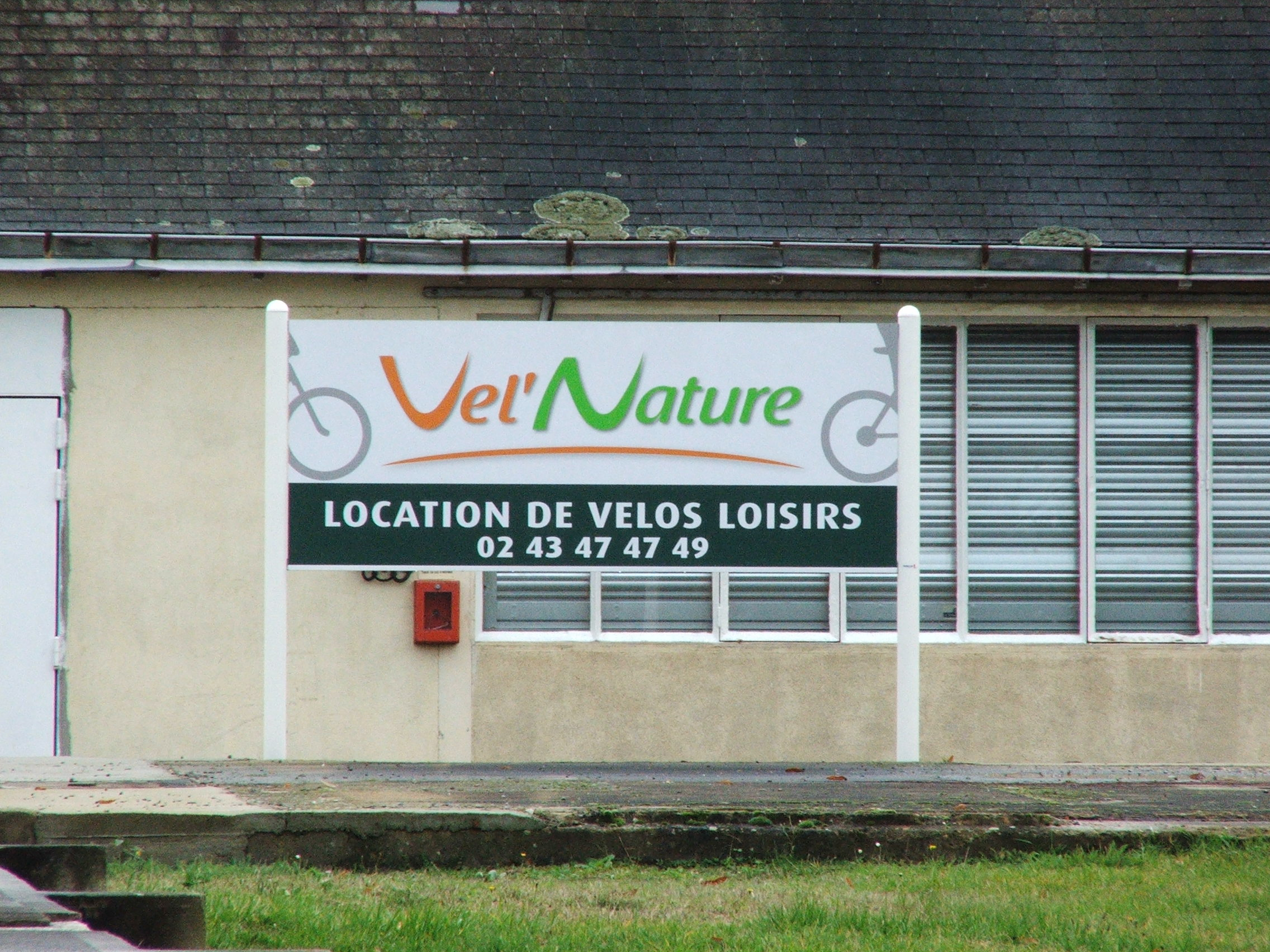 Station de prêt de vélos au Mans, le Vel'Nature.